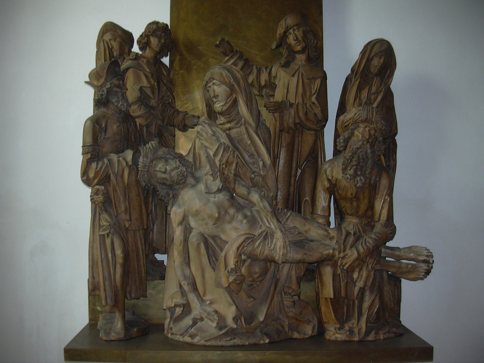 Church St. Peter + Paul, Pietà group by Tilman Riemenschneider, Großostheim, Bavaria/Germany